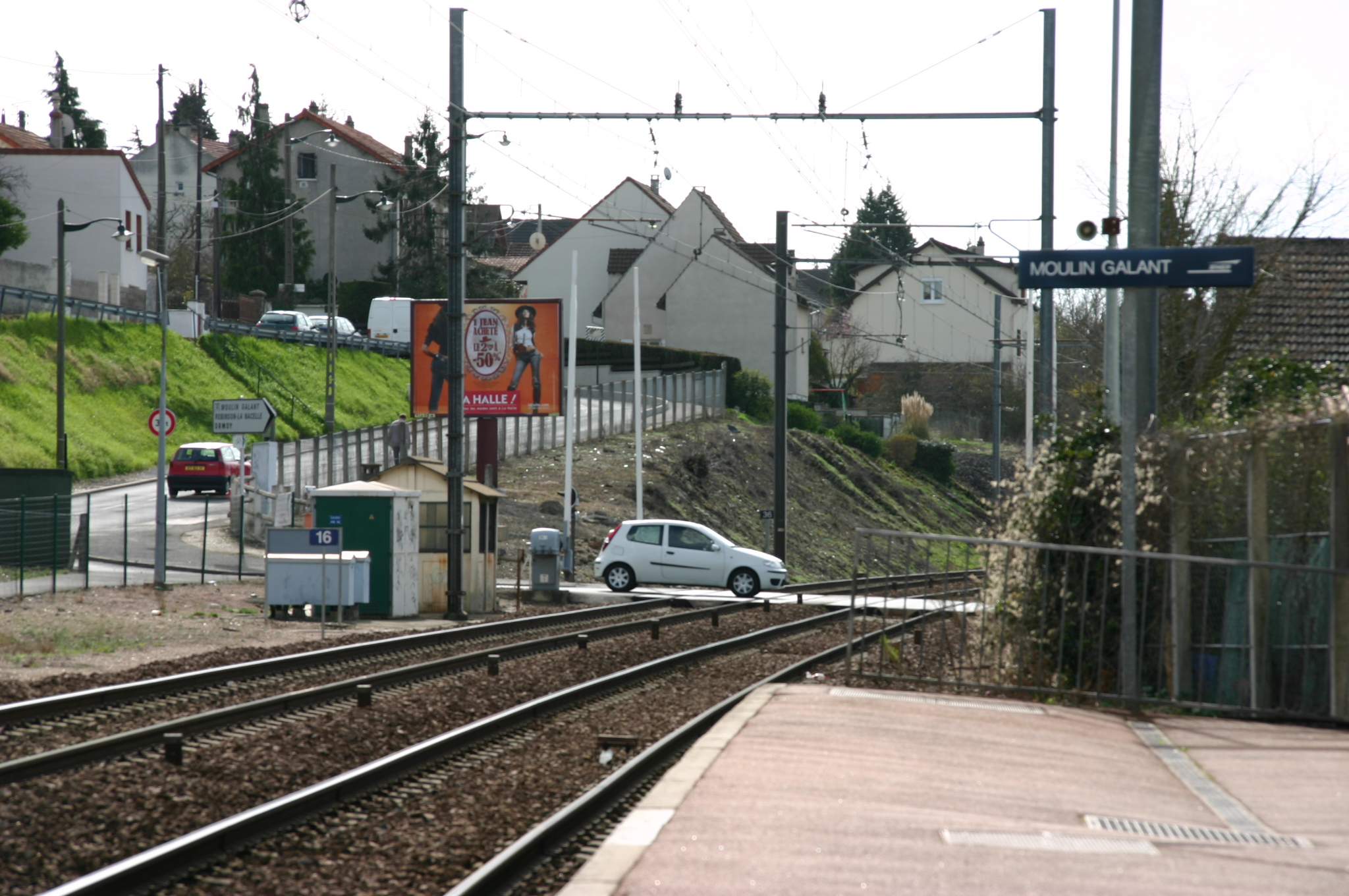 La gare de Moulin-Galant, Corbeil-Essonnes, département de l'Essonne (France)